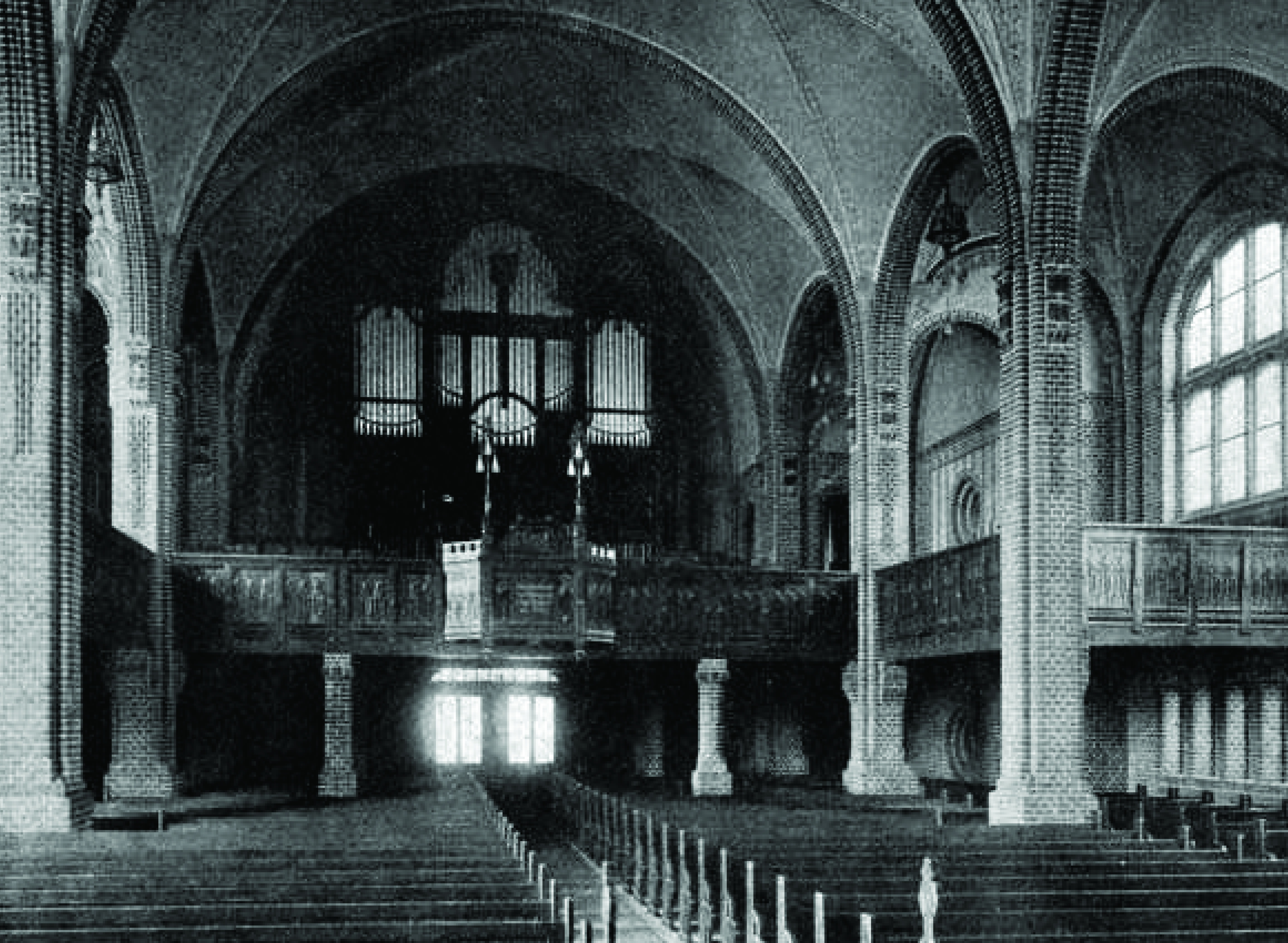 eingescannte Abbildung der Orgel der Martin-Lutherkirche (Berlin-Neukölln) von 1909